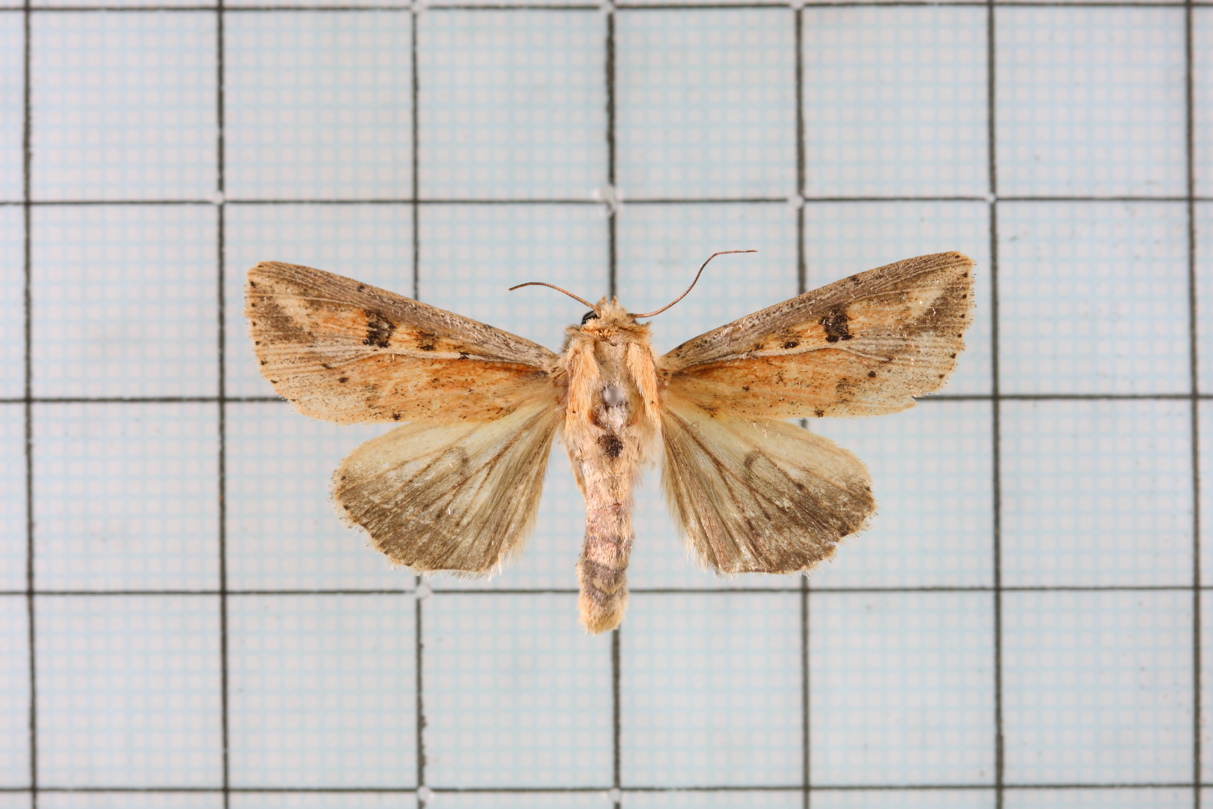 Mythimna albomarginata rubea Yoshimatsu 白緣秘夜蛾 鞍1:P.117,Pl.28-23